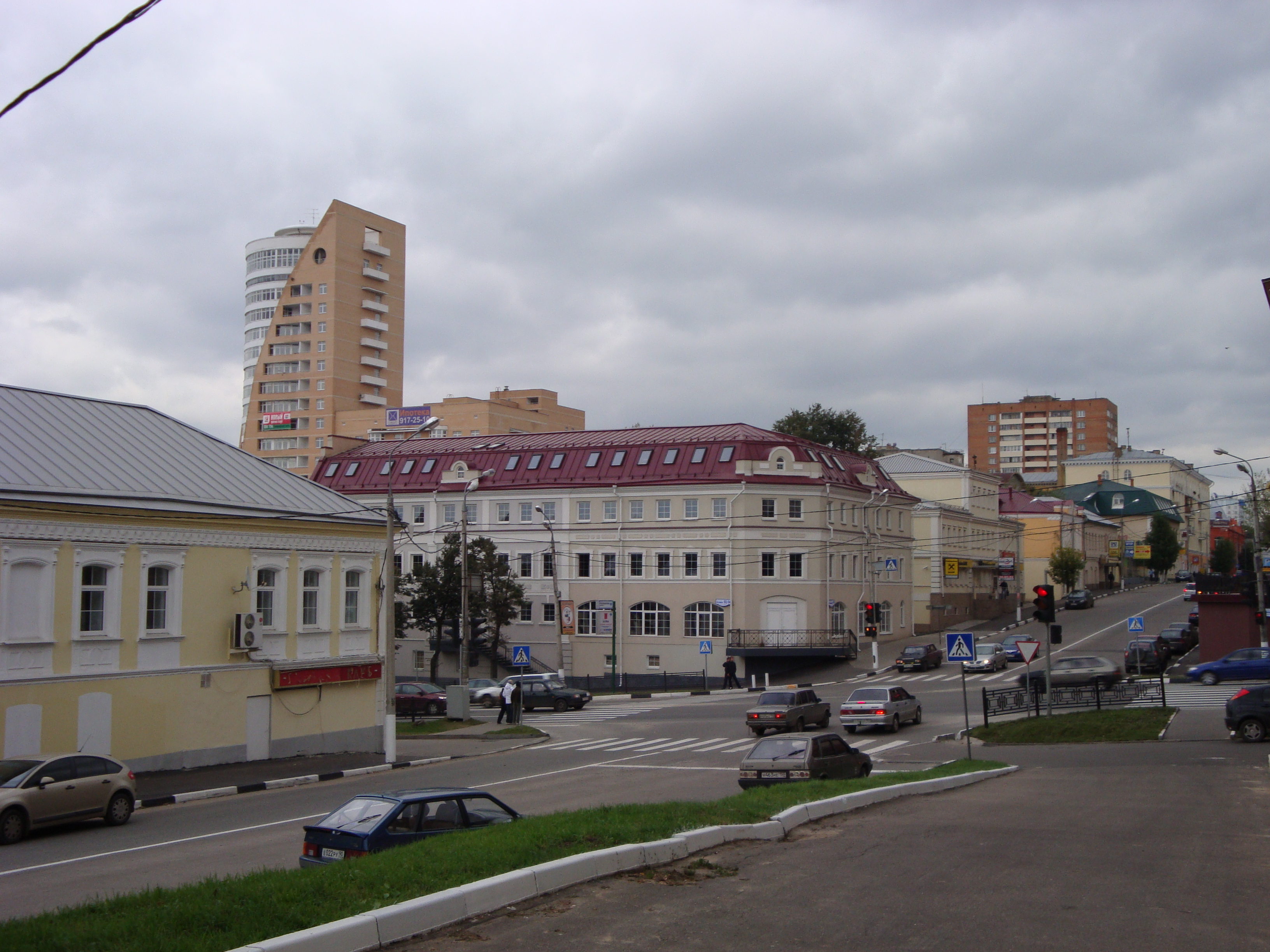 Здания в историческом центре Подольска на пересечении Февральской улицы и проспекта Ленина.